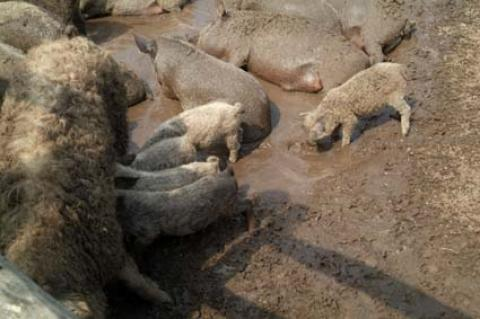 Mangalica, Hungary